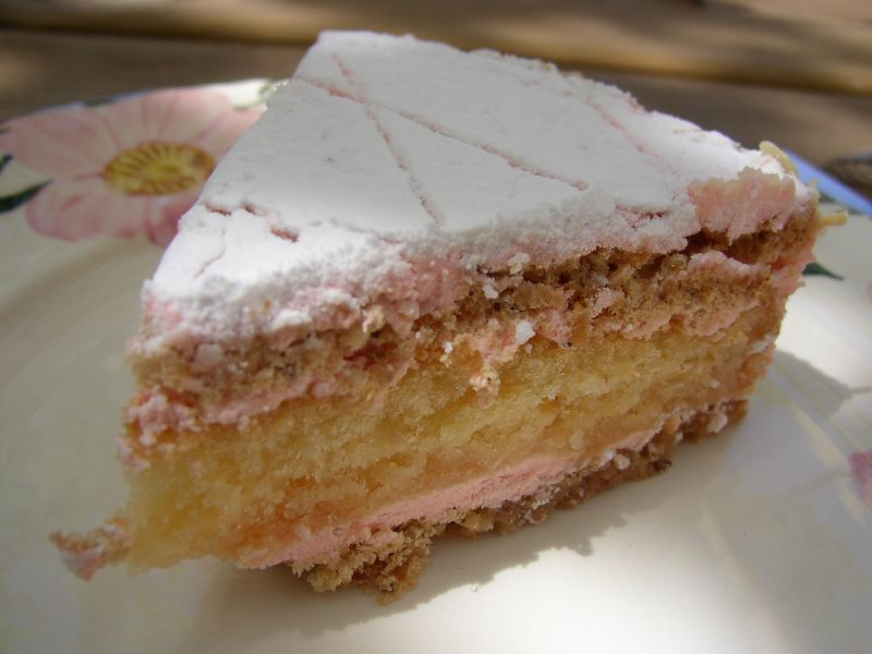 Ein Stück Zuger Kirschtorte